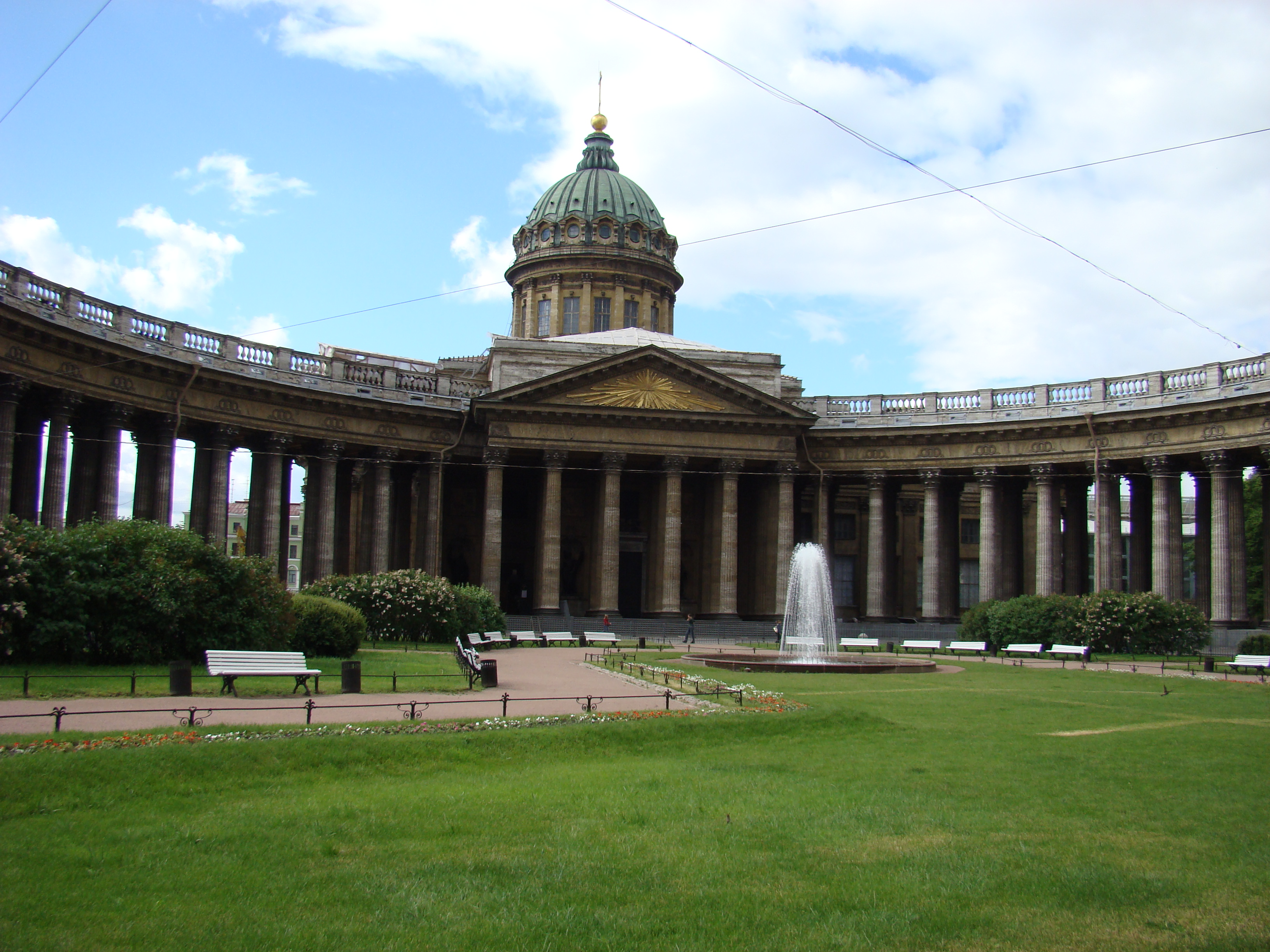 Kasaner-Kathedrale St. Petersburg